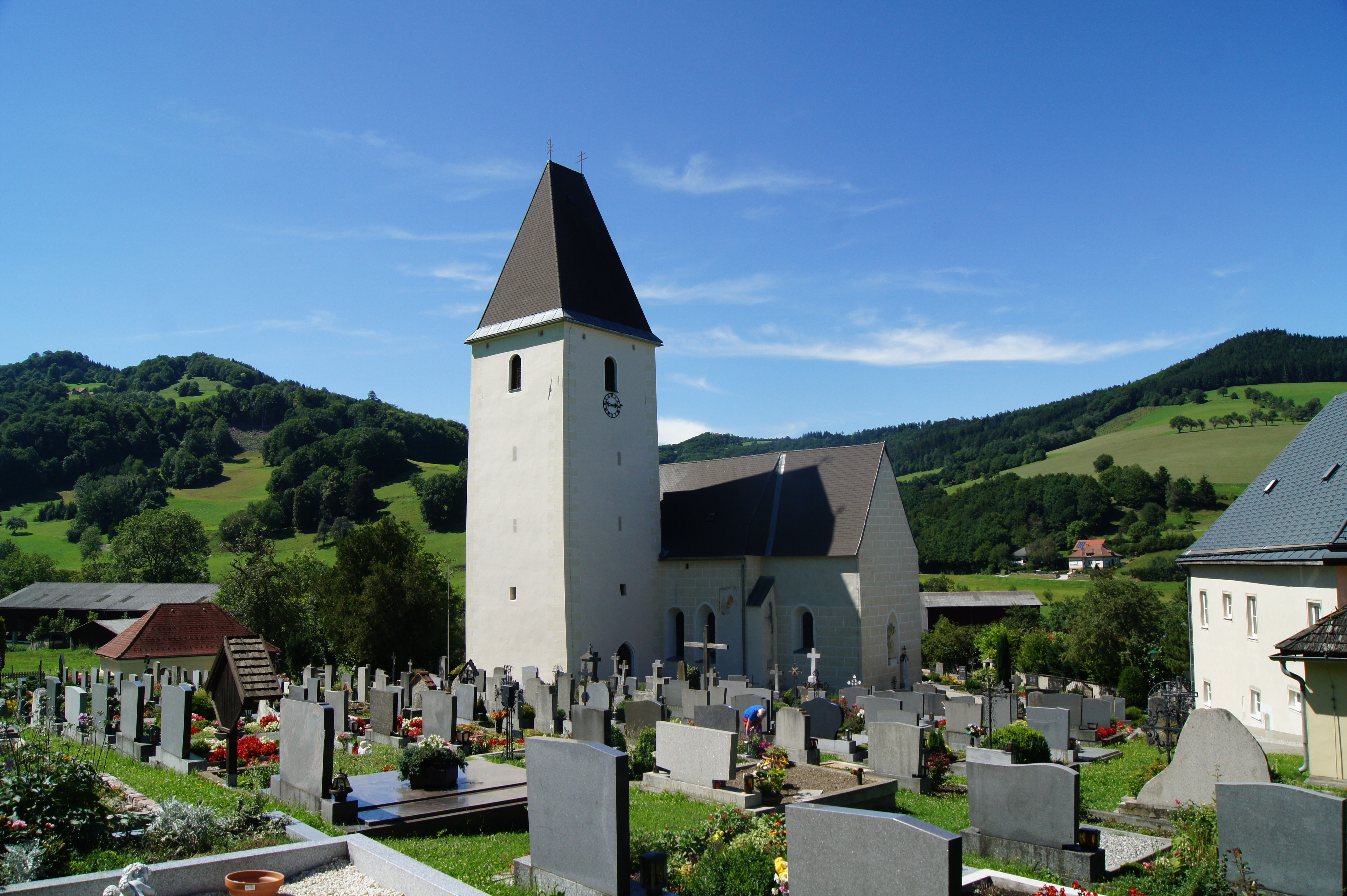 Kath. Pfarrkirche hl. Katharina und Friedhof